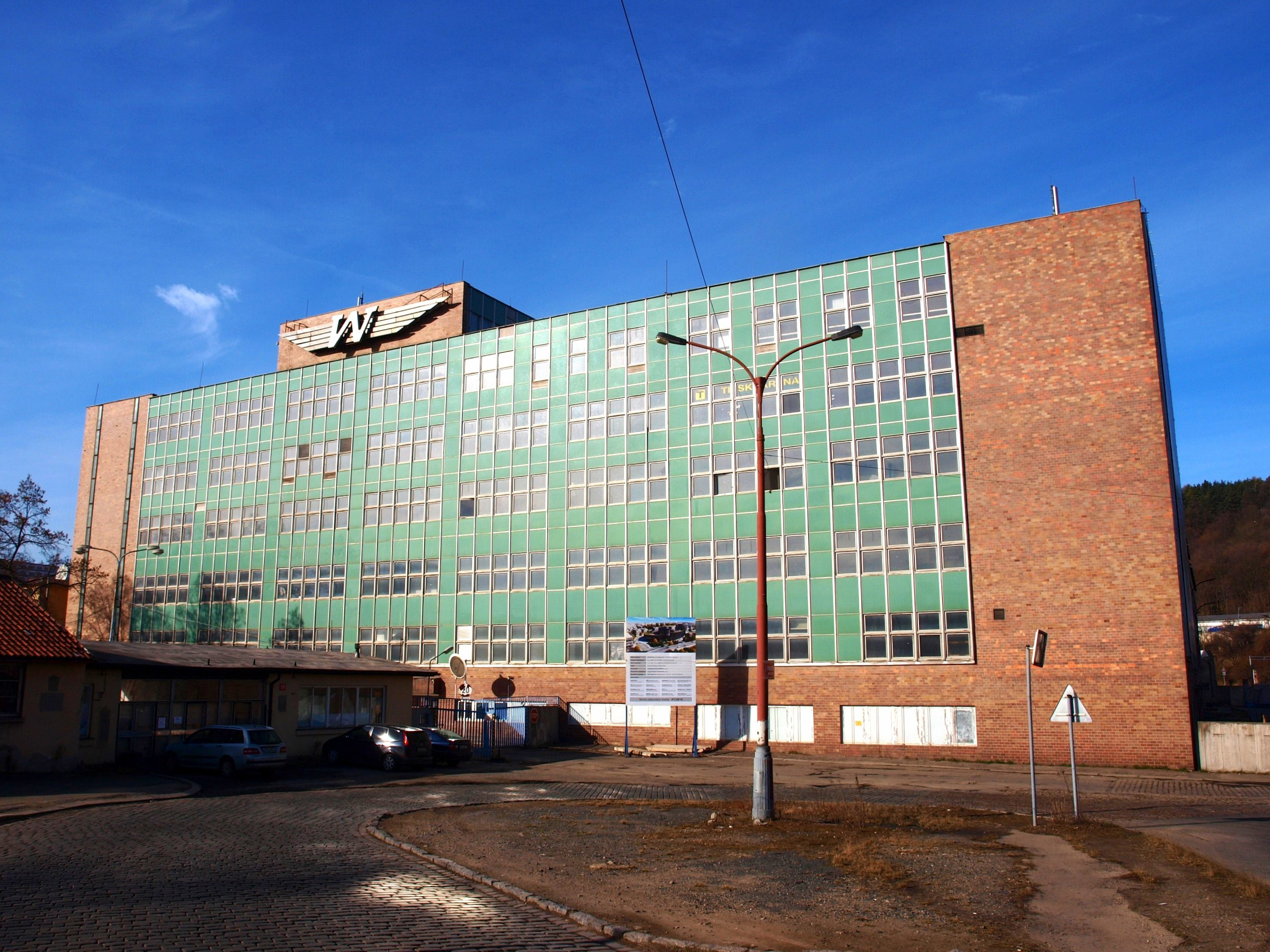 Waltrovy letecké závody Jinonice